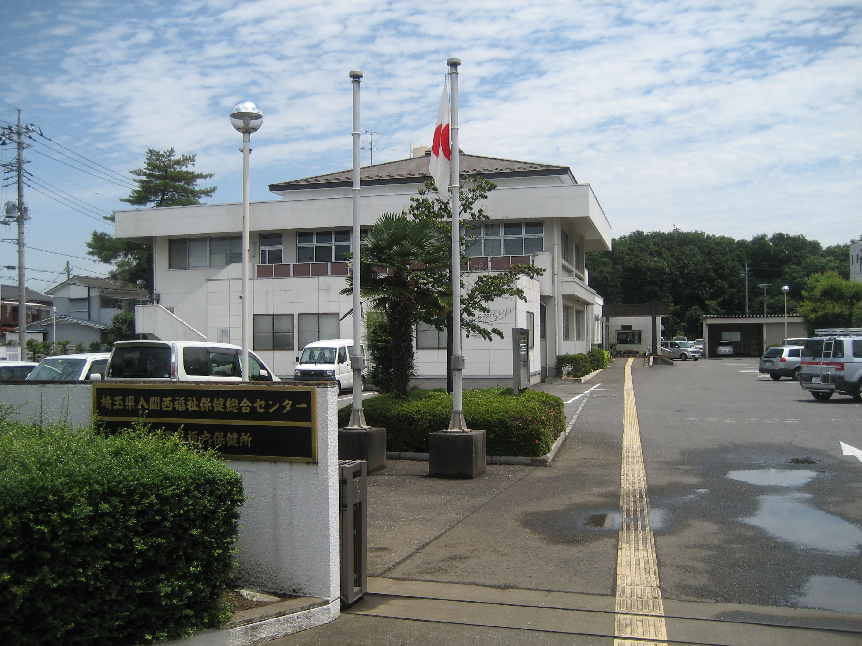 埼玉県入間西総合福祉センター庁舎（坂戸市）